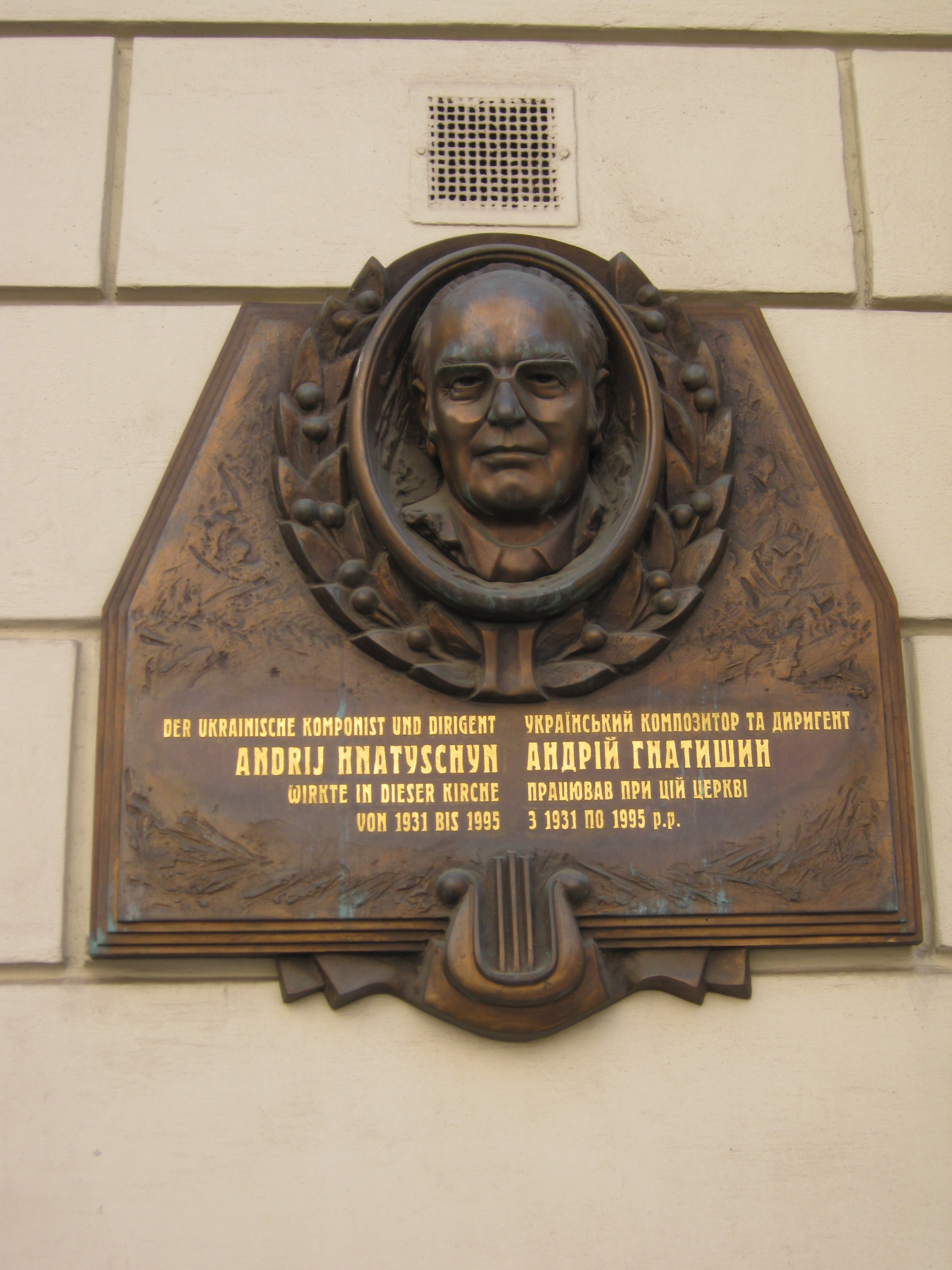 Andrii Hnatyshyn memorial plaque